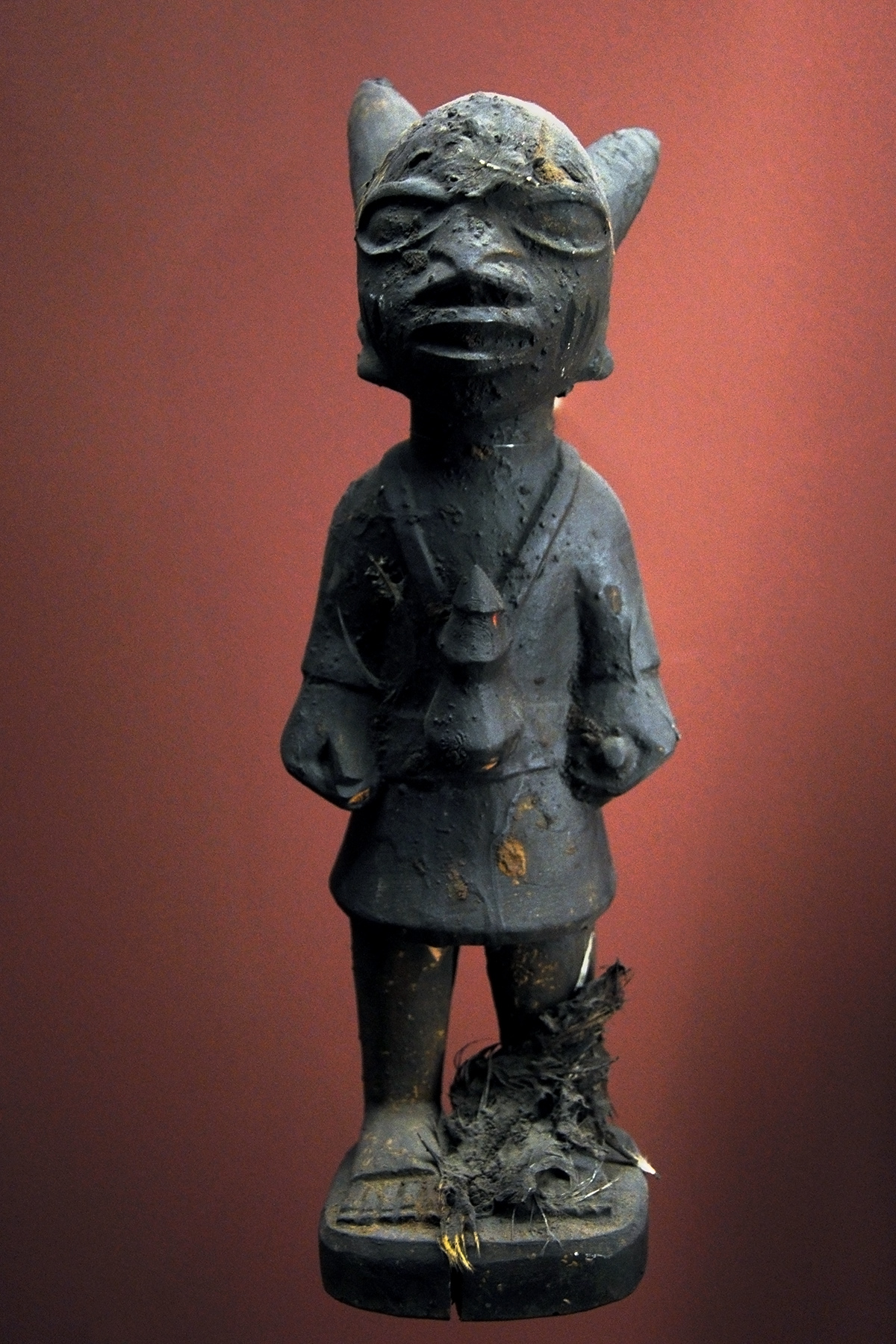 Statuette représentant un Orisha ( divinité ), culture Yoruba, fin du 19ème siècle. Provient d'Abeokuta au Nigéria. Musée africain de Lyon.